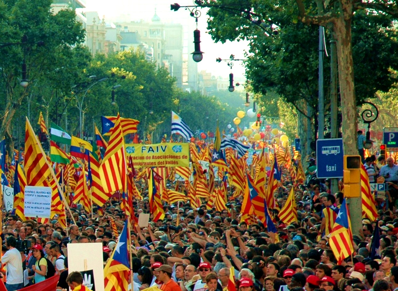 Ebullició independentista